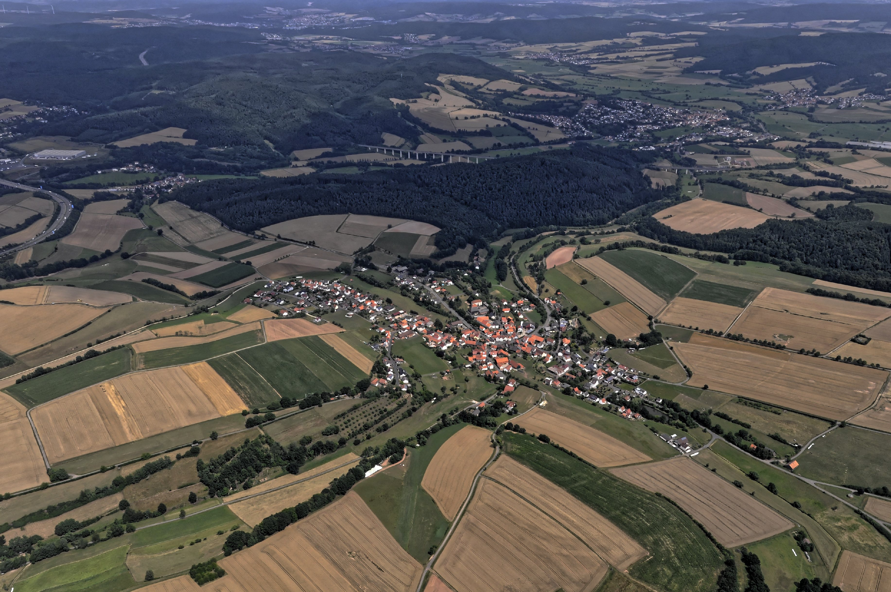 Bilder vom Flug Nordholz-Hammelburg 2015: Hattenbach; dahinter links die Aula-Talbrücke der ICE-Schnellfahrstrecke Hannover–Würzburg über die B 454 bei Niederaula, rechts davon die Hattenbach-Talbrücke. Dahinter Niederaula.